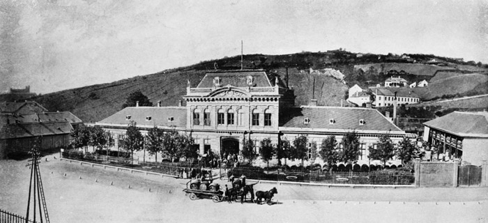 Palais palugyay, Bratislava/Pozsnoy/Presbourg, fin XIXe, siège du vignoble Palugyay, "Château Palugyay".